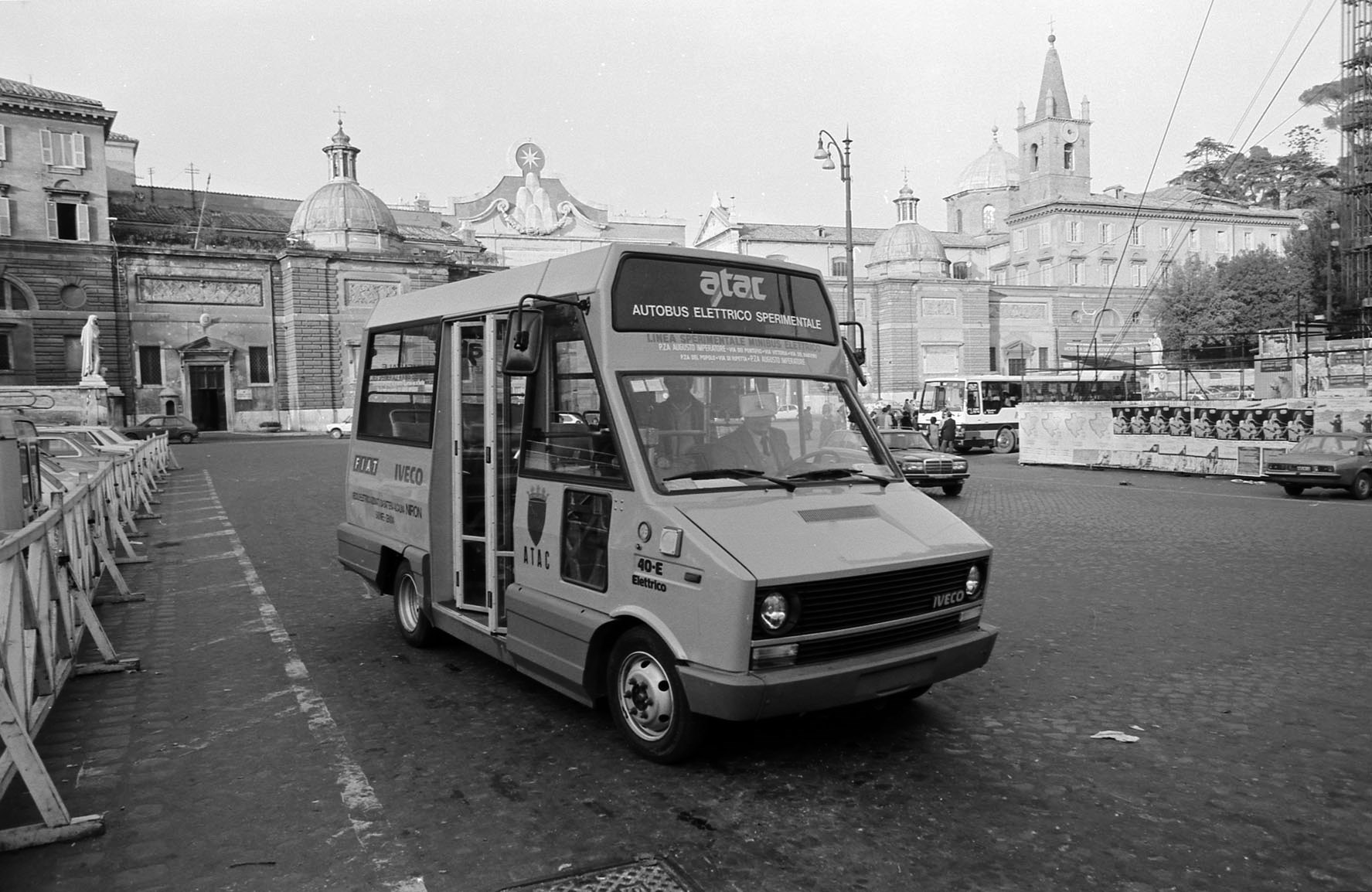 Pulmino sperimentale elettrico durante le prove di servizio